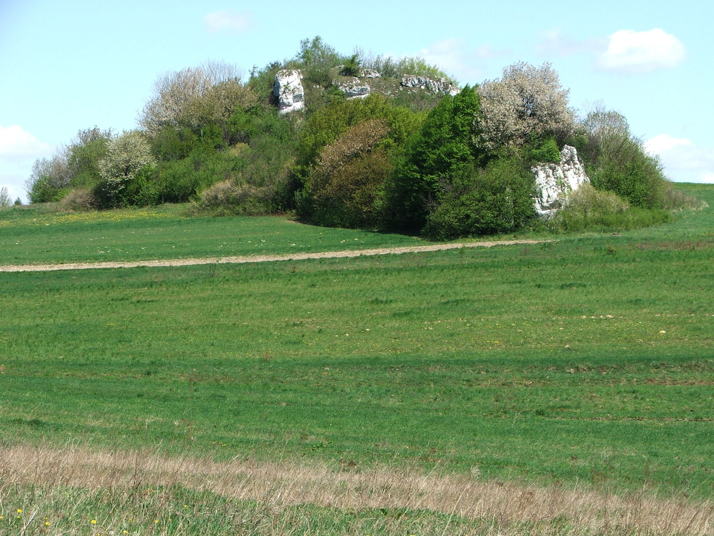 Jerzmanowice (województwo małopolskie). Grupa skałek Łaziska.